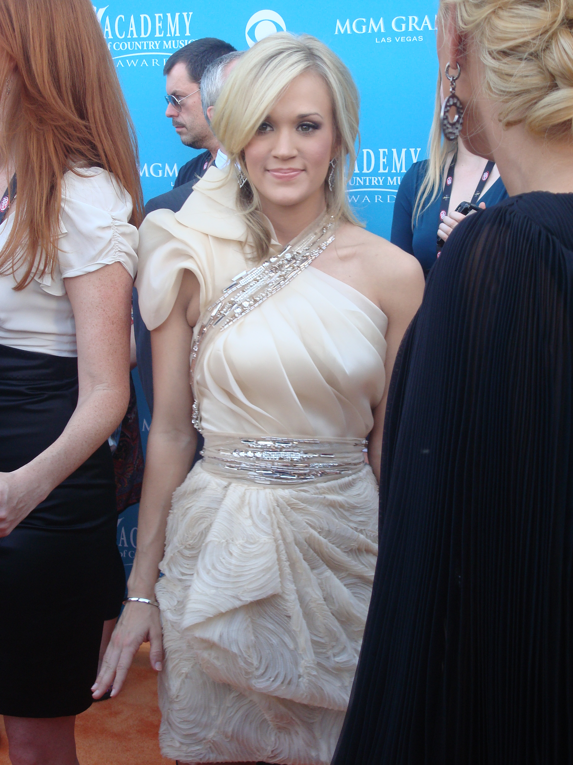 Carrie Underwood